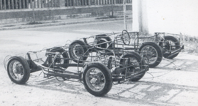 Bandini 750 sport internazionale "saponetta" tratta dal libro Bandini (storia e automobili di Ilario Bandini)